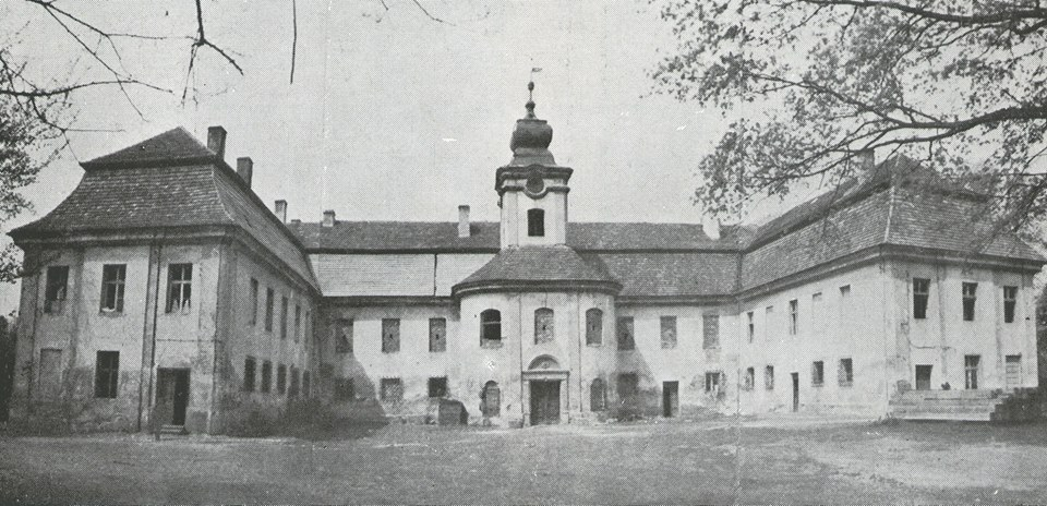 Lata 1962-1963 , Późnobarokowy pałac w Rozkochowie na początku lat sześćdziesiątych XX wieku. Wybudowany w 1734 roku, prawdopodobnie z wykorzystaniem murów poprzedniego, odnowiony w 1792 roku.